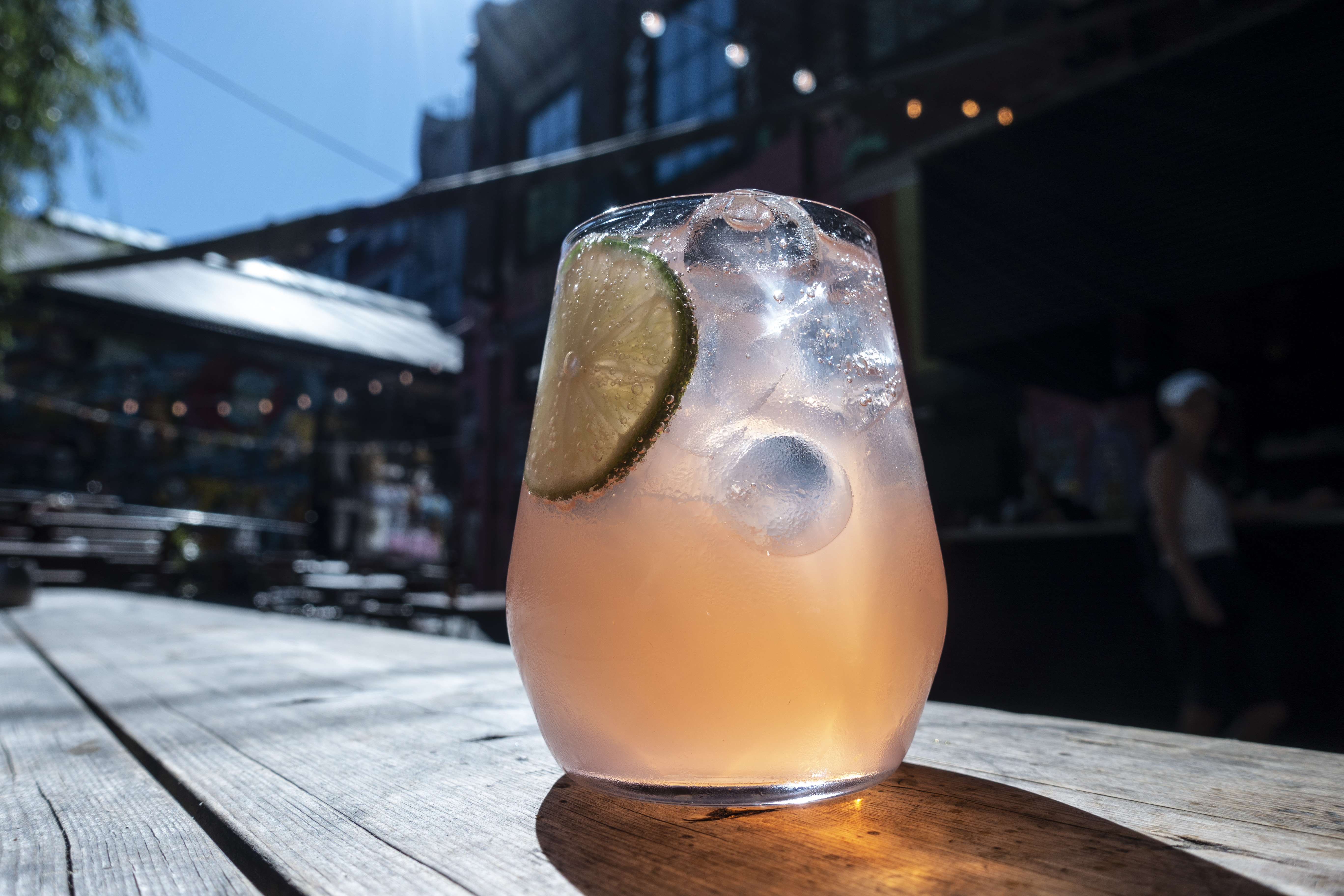 Uteserveringen på Blå